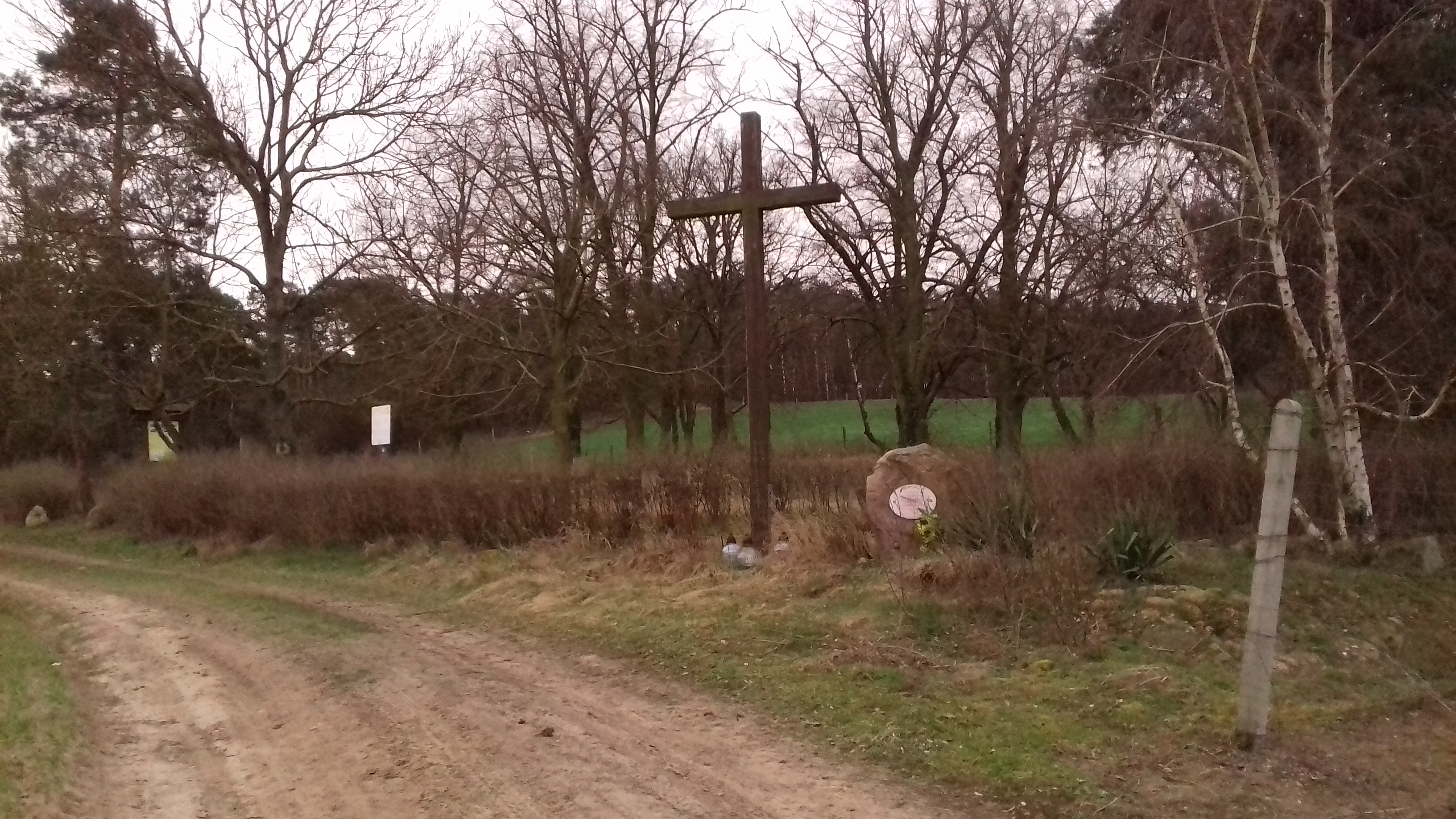 Cmentarz ewangelicki w Żabnie